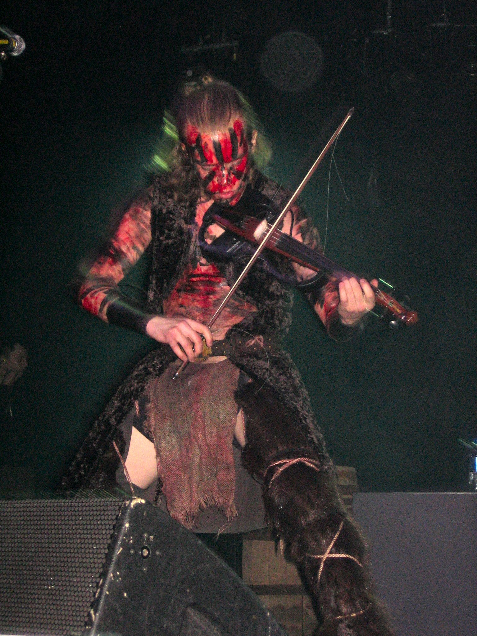 Olli Vänskä, the violinist of Turisas, at Finnish Metal Expo 2008